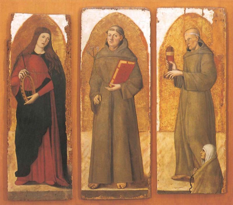 Tuccio d'Andria - Santa Caterina Alessandria, Sant'Antonio da Padova, San Giacomo della Marca fine XV - inizi XVI secolo olio su tavola - cm144x160 Pinacoteca Bari